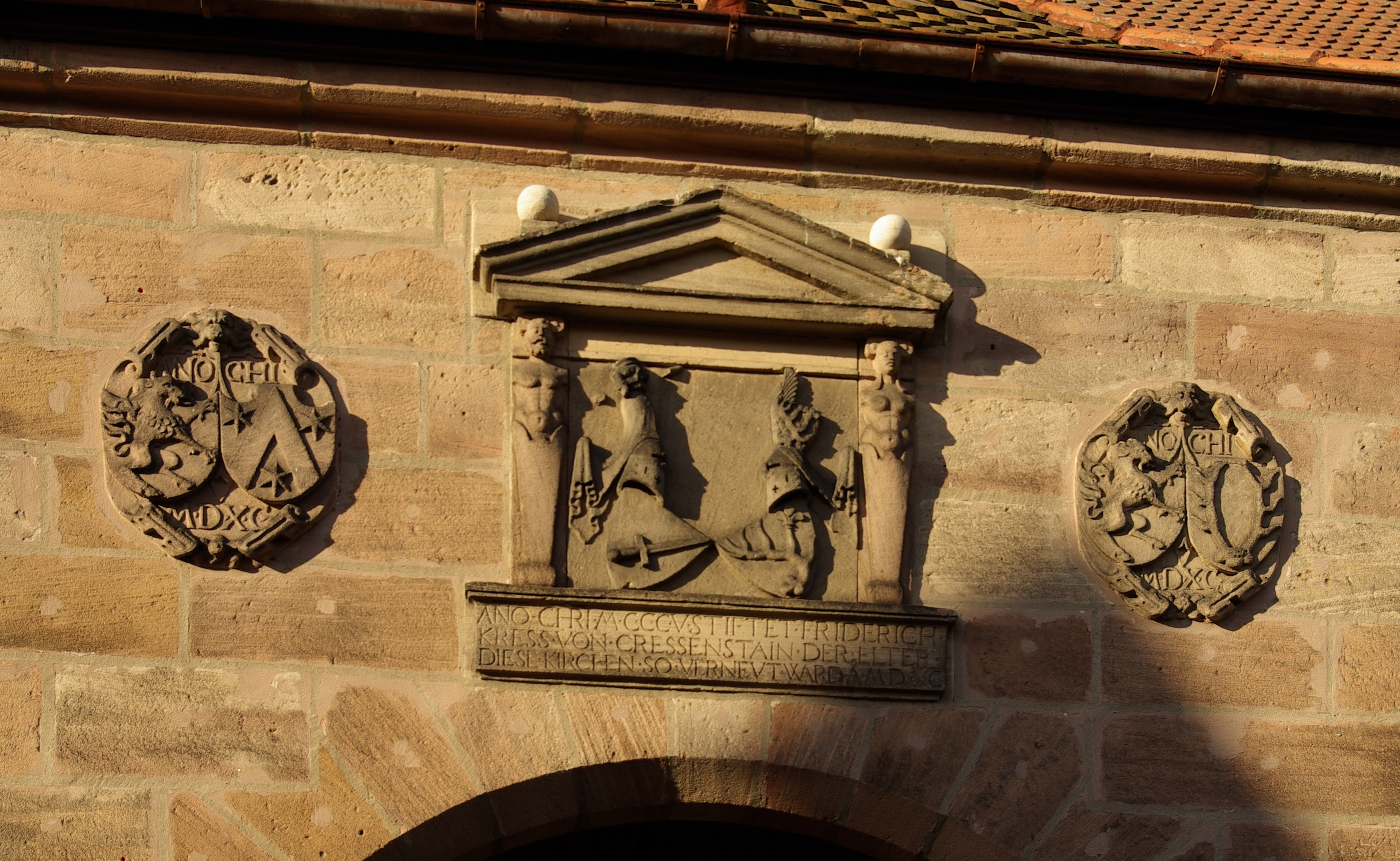 Kirche St. Georg in Kraftshof, Wappen (u.a. der Patrizier Kreß von Kressenstein) über dem Eingang der Kirche